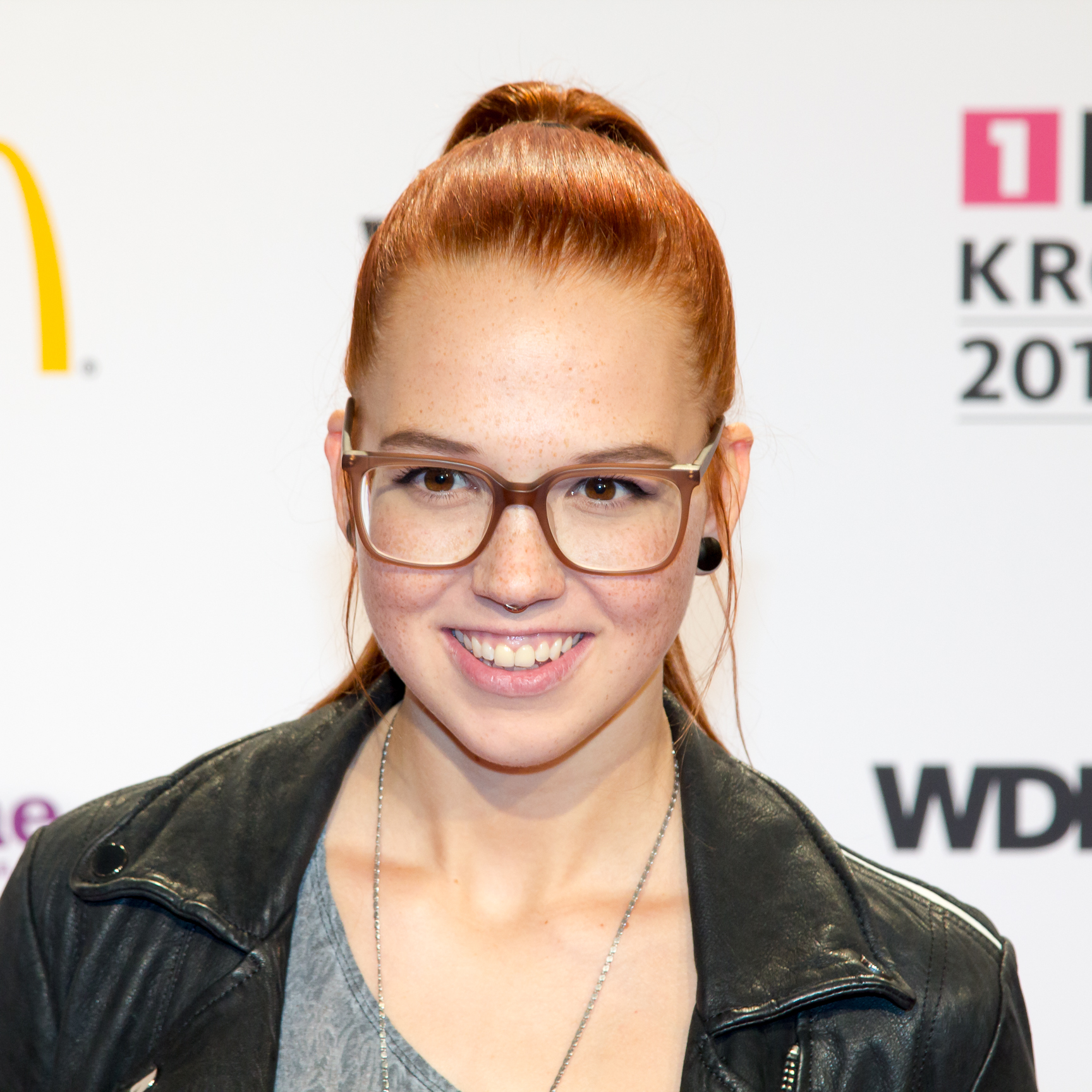 1liVE Krone 2015 - Stefanie Heinzmann